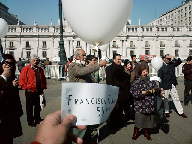 Acto ralizado el 3 de agosto del 2007 en favor al pronto promulgamiento de la ley contra el femicidio en Chile, este acto fue convocado por las juventudes socialistas de Chile y se llevo a cabo en la plaza de la Constitucion, ubicada detras del palacio de la Moneda de Santiago de Chile